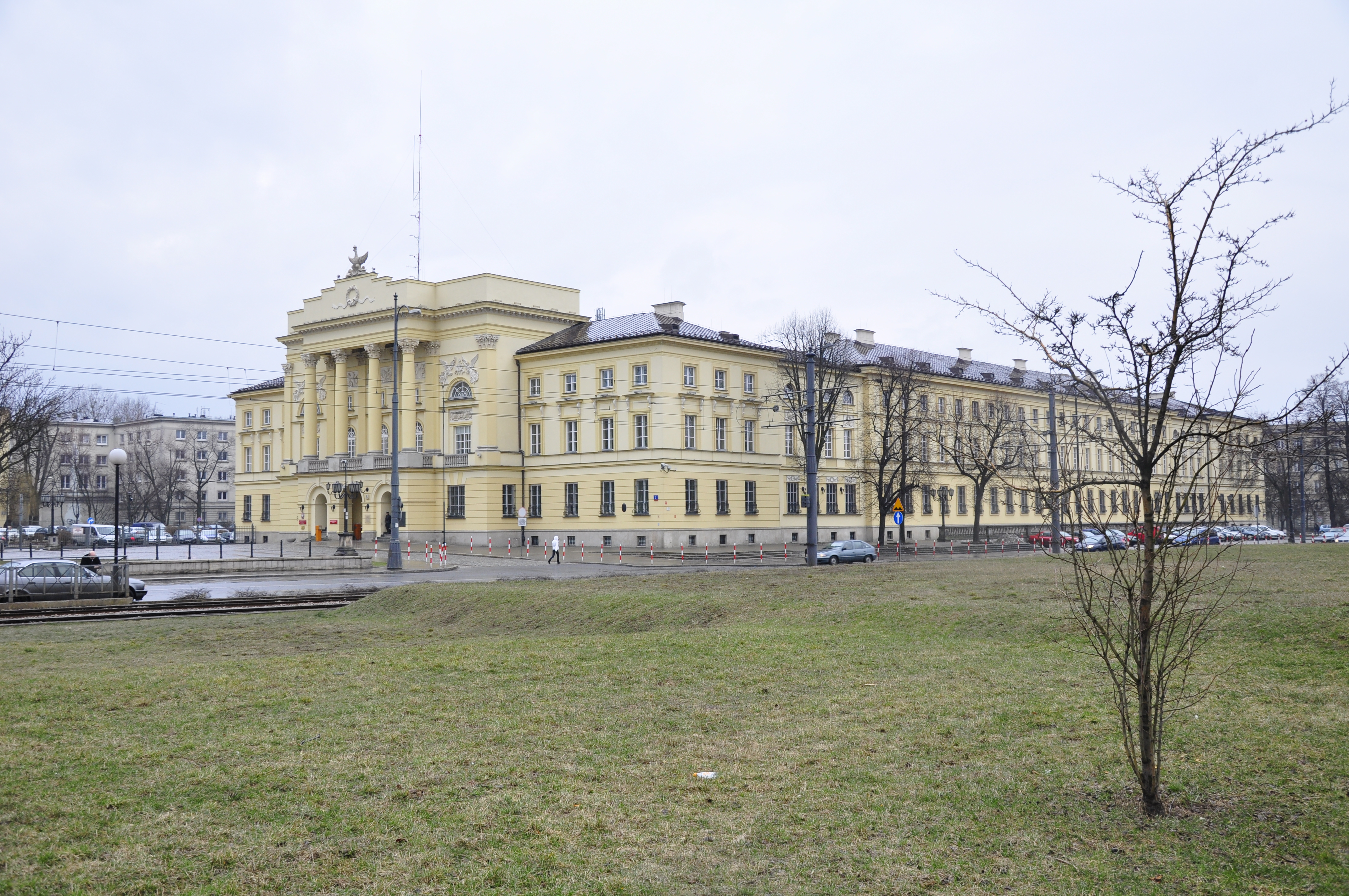 Warschau